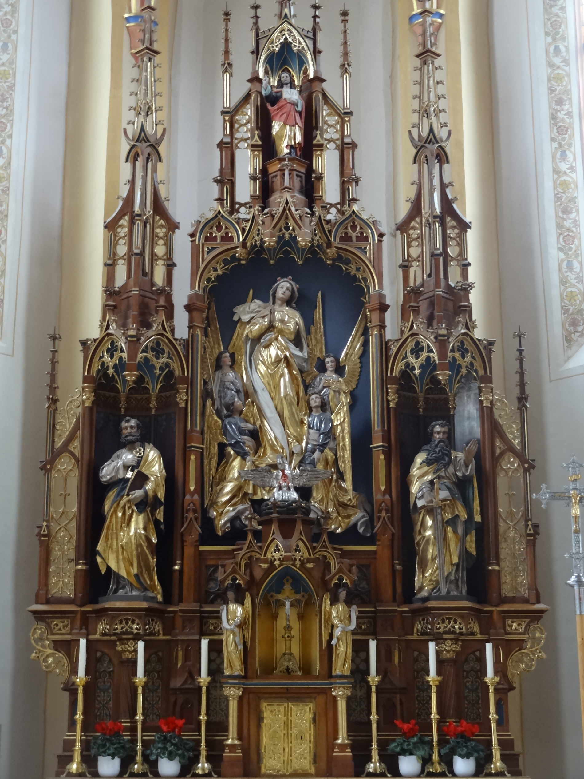 Hochaltar der Pfarrkirche Mariä Himmelfahrt in Bonbruck (Gde. Bodenkirchen, Lkr. Landshut, Bayern)